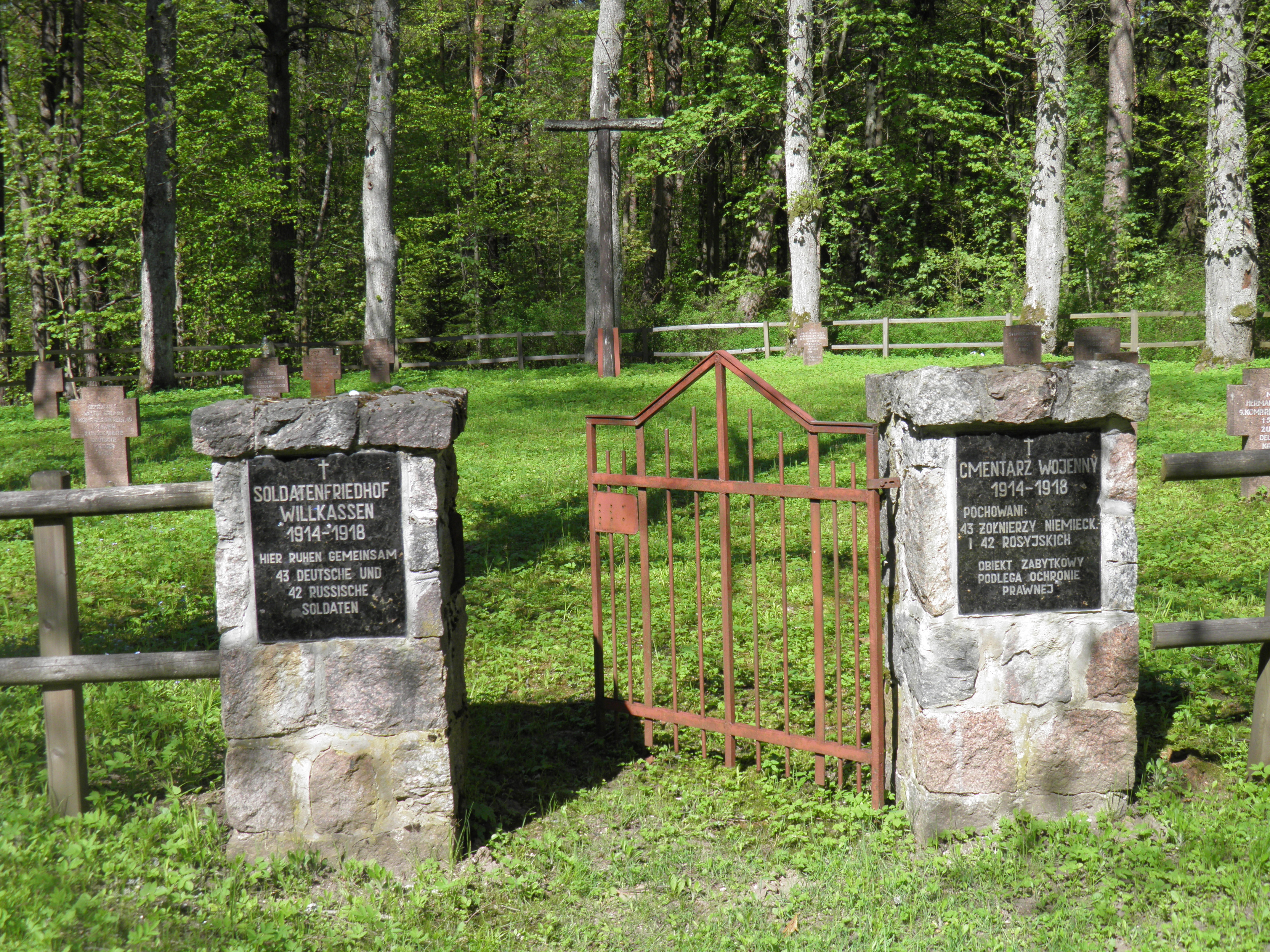 Wilkasy, cmentarz wojenny z I wojny światowej